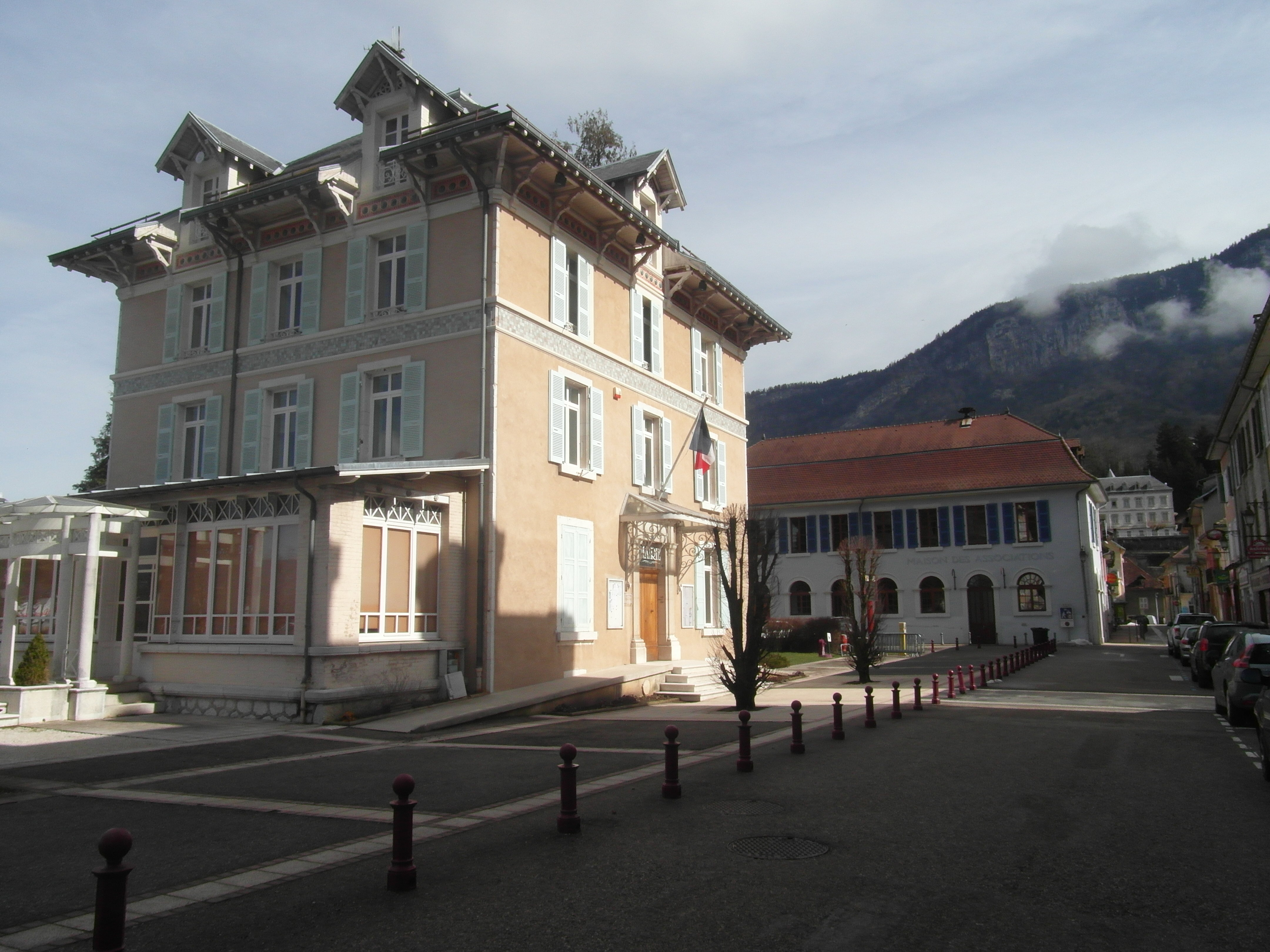 centre-ville de Saint-Laurent du Pont